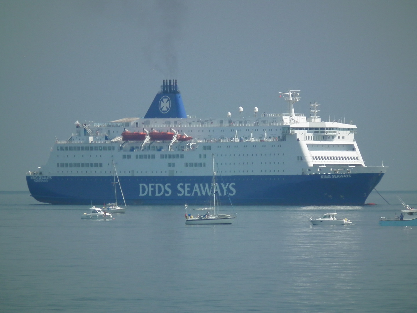 King Seaways